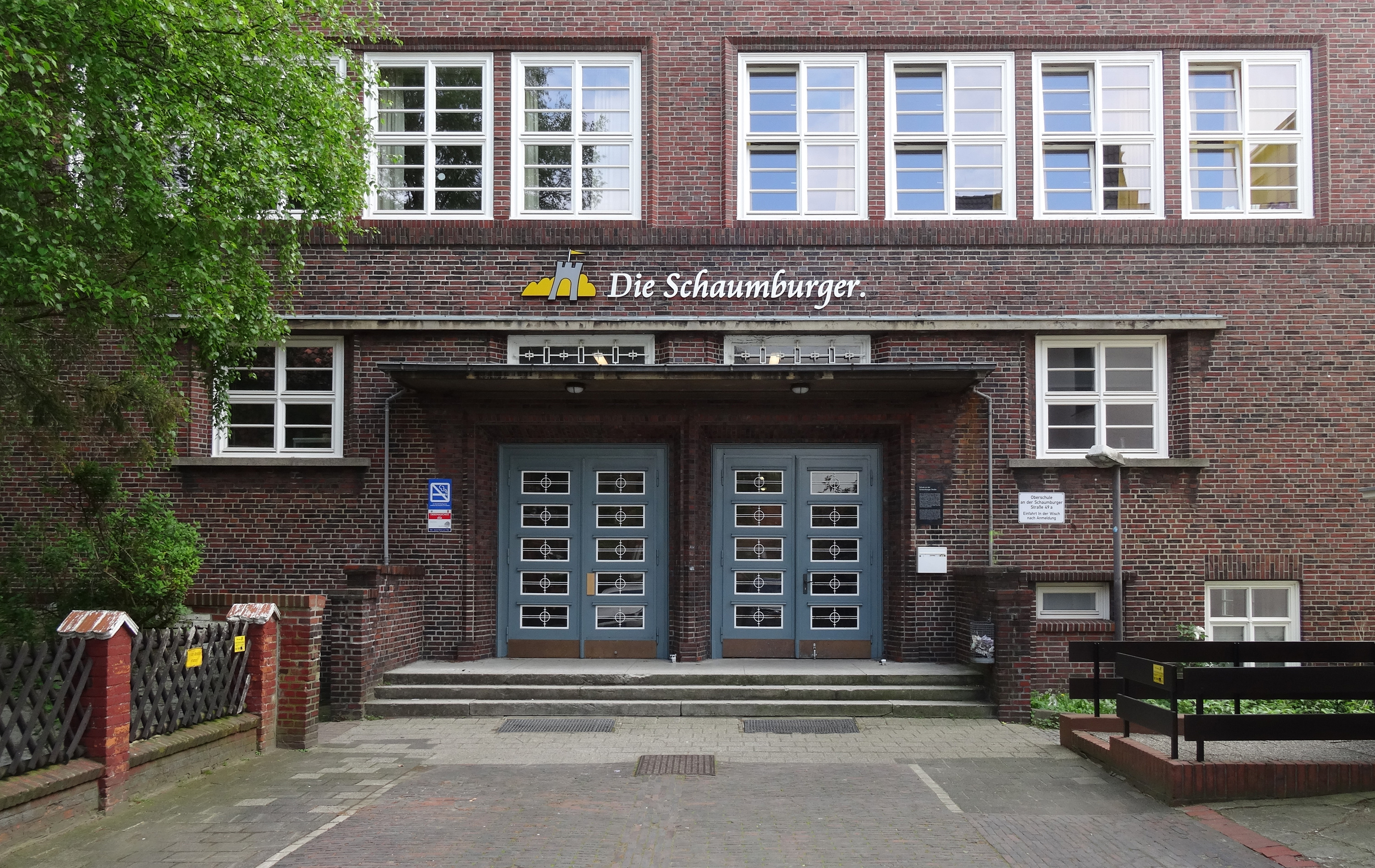 Schule Schaumburger Straße in Bremen, Schaumburger Straße 49ADas abgebildete Objekt ist ein geschütztes Kulturdenkmal in der Freien Hansestadt Bremen, mit der Nr. 1099 beim Landesamt für Denkmalpflege registriert.